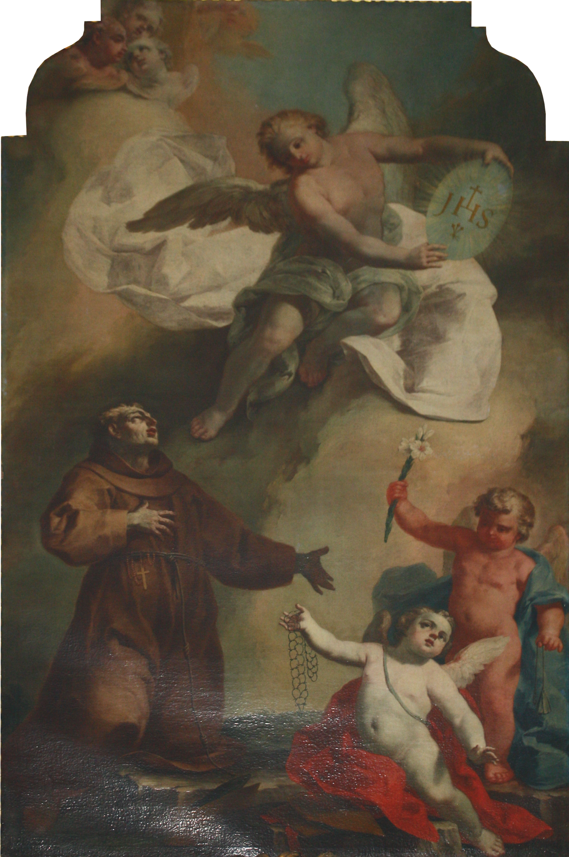 Dipinto raffigurante L'angelo appare a San Bernardino, opera di Biagio Bellotti degli anni 1750, situato in origine nella vecchia chiesa della Beata Vergine Assunta (demolita nel 1974) e oggi conservato presso la nuova chiesa omonima.